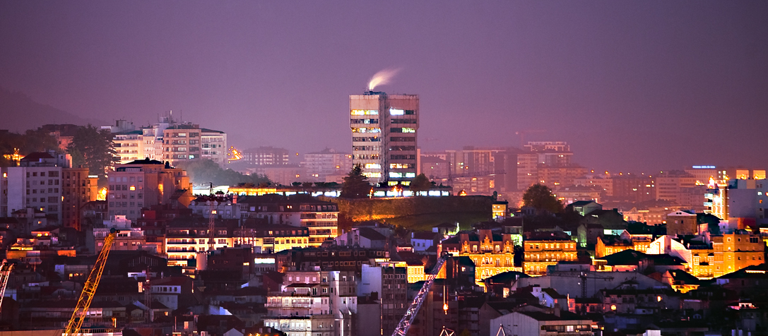 Vista nocturna de la ciudad de Vigo, donde se puede apreciar el Ayuntamiento al fondo (Vigo, Galicia, España).